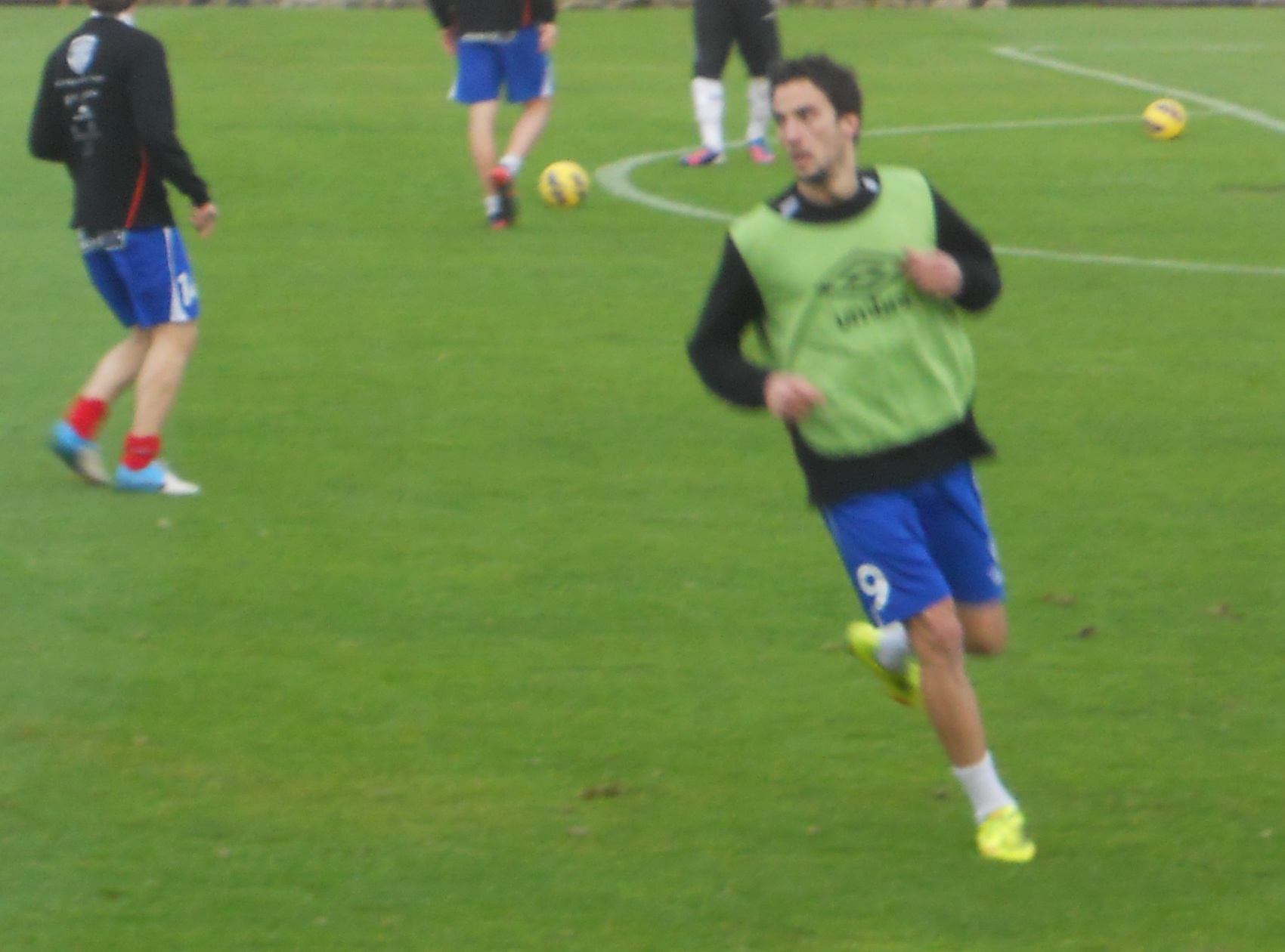 Óscar Díaz co CD Lugo ante a UD Las Palmas no Estadio Anxo Carro de Lugo.